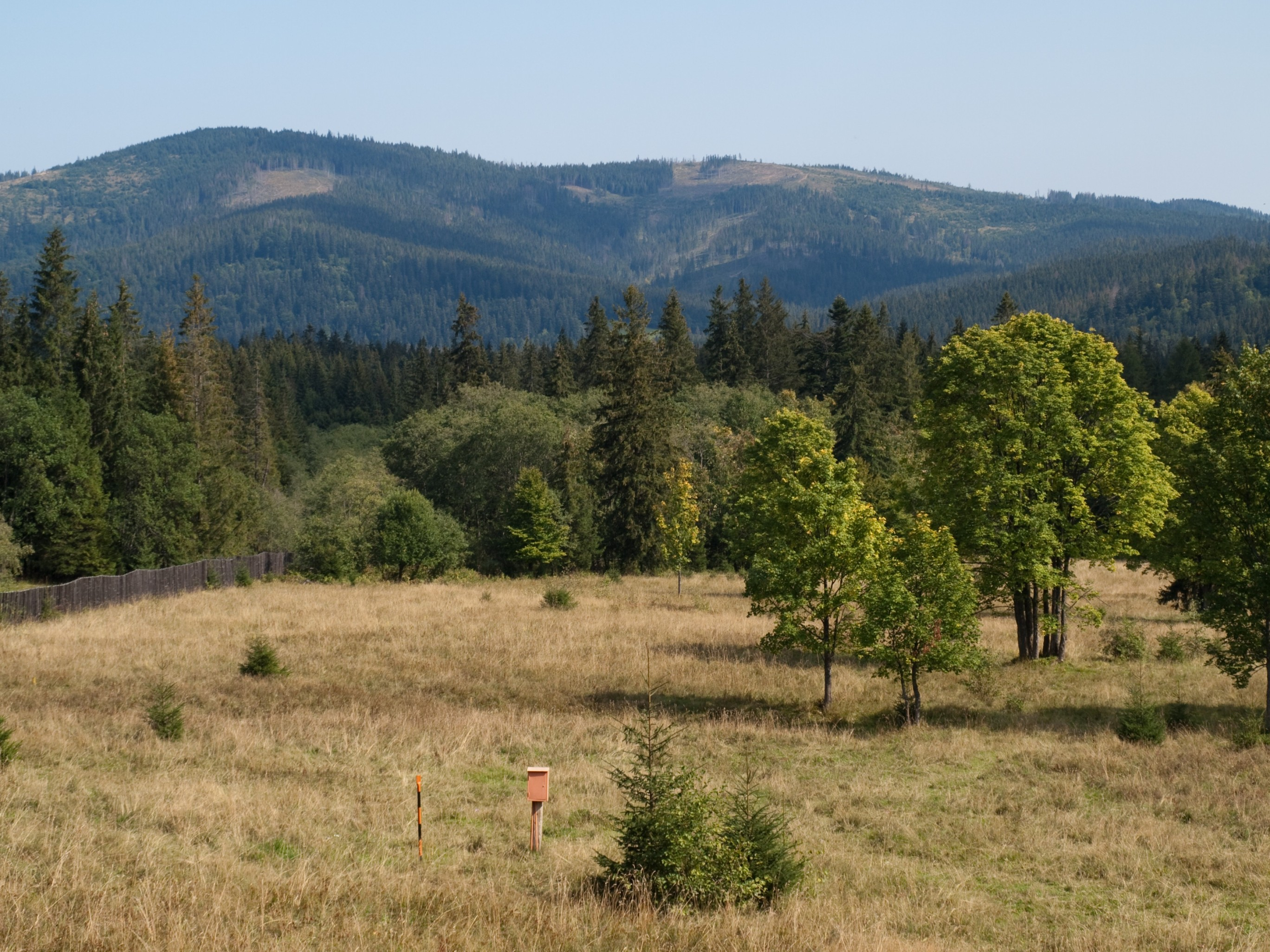 Rzepisko i Przysłop – widok z Jaworzyny Spiskiej.